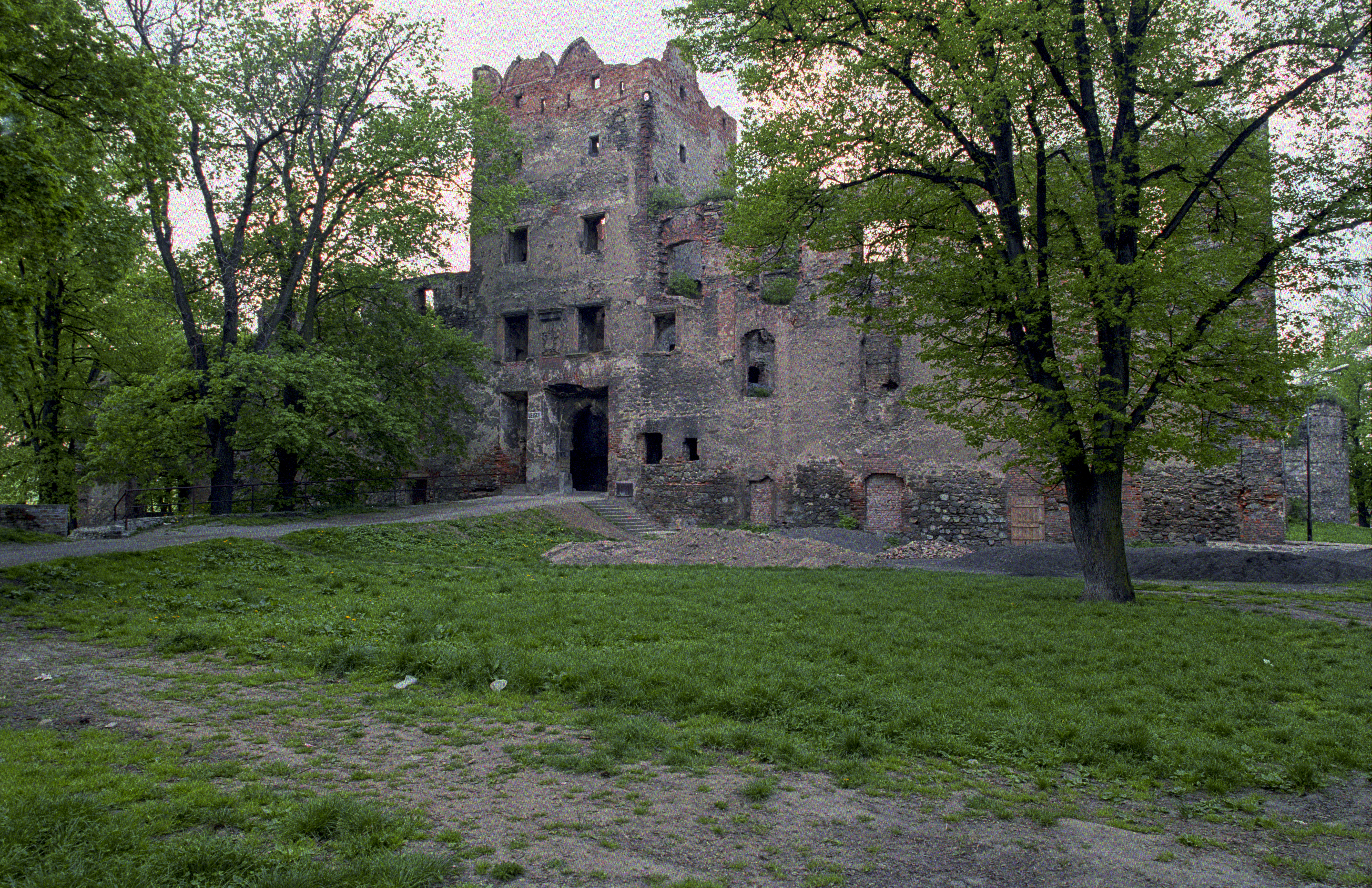 Ząbkowice Śląskie, ruiny zamku